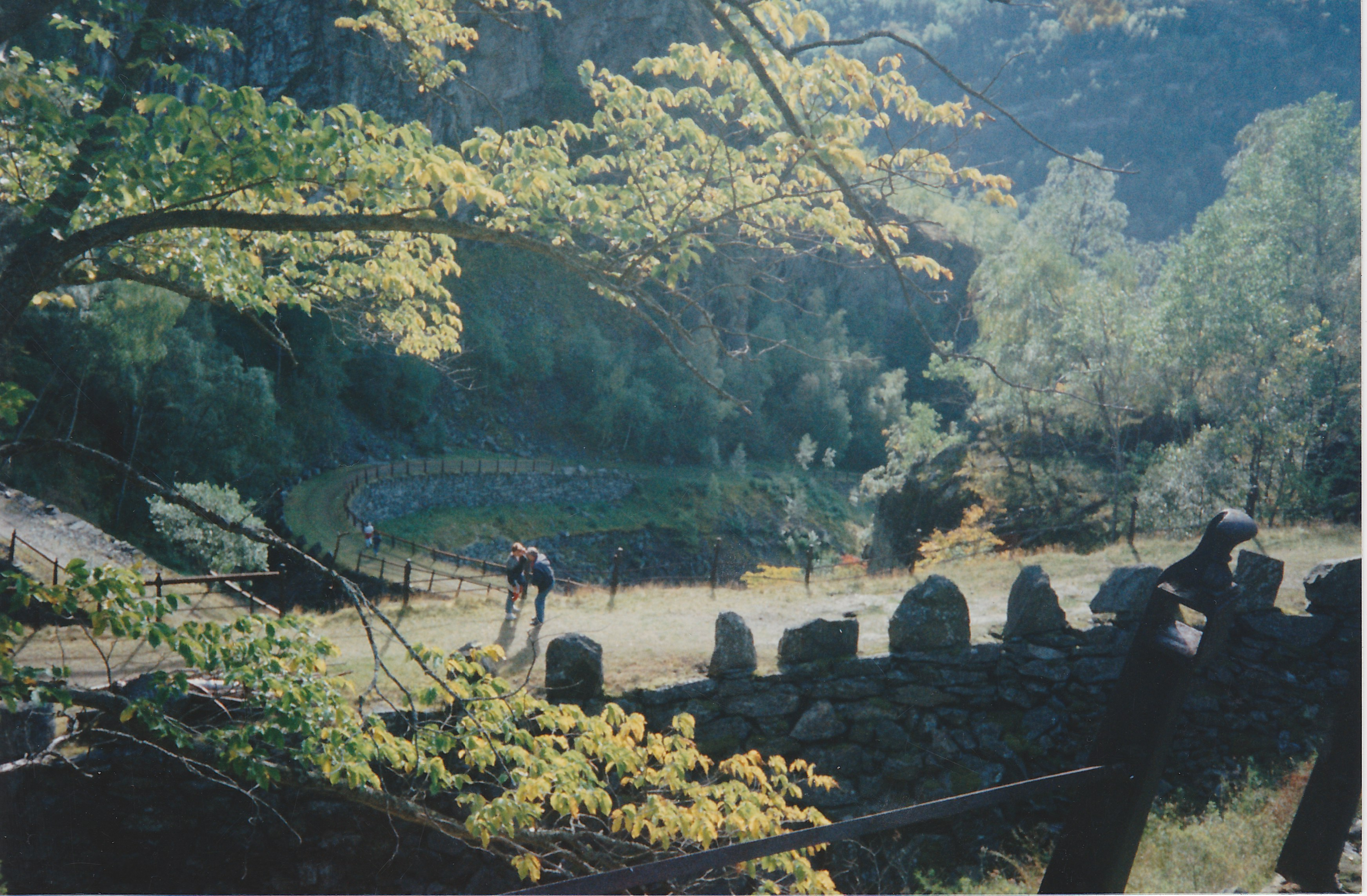 Vindhelleveien, Lærdal (1993).